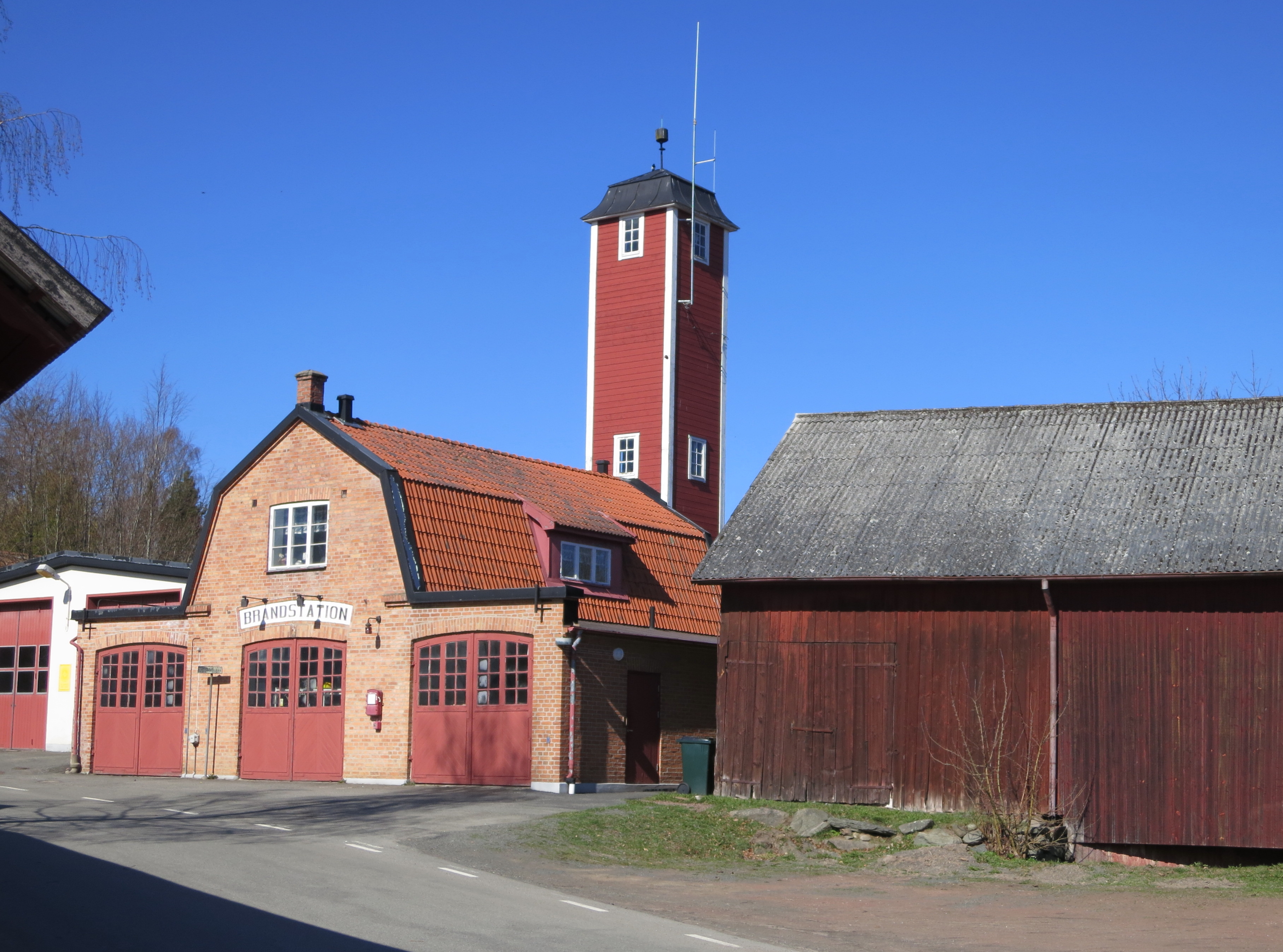 Arkelstorps brandstation